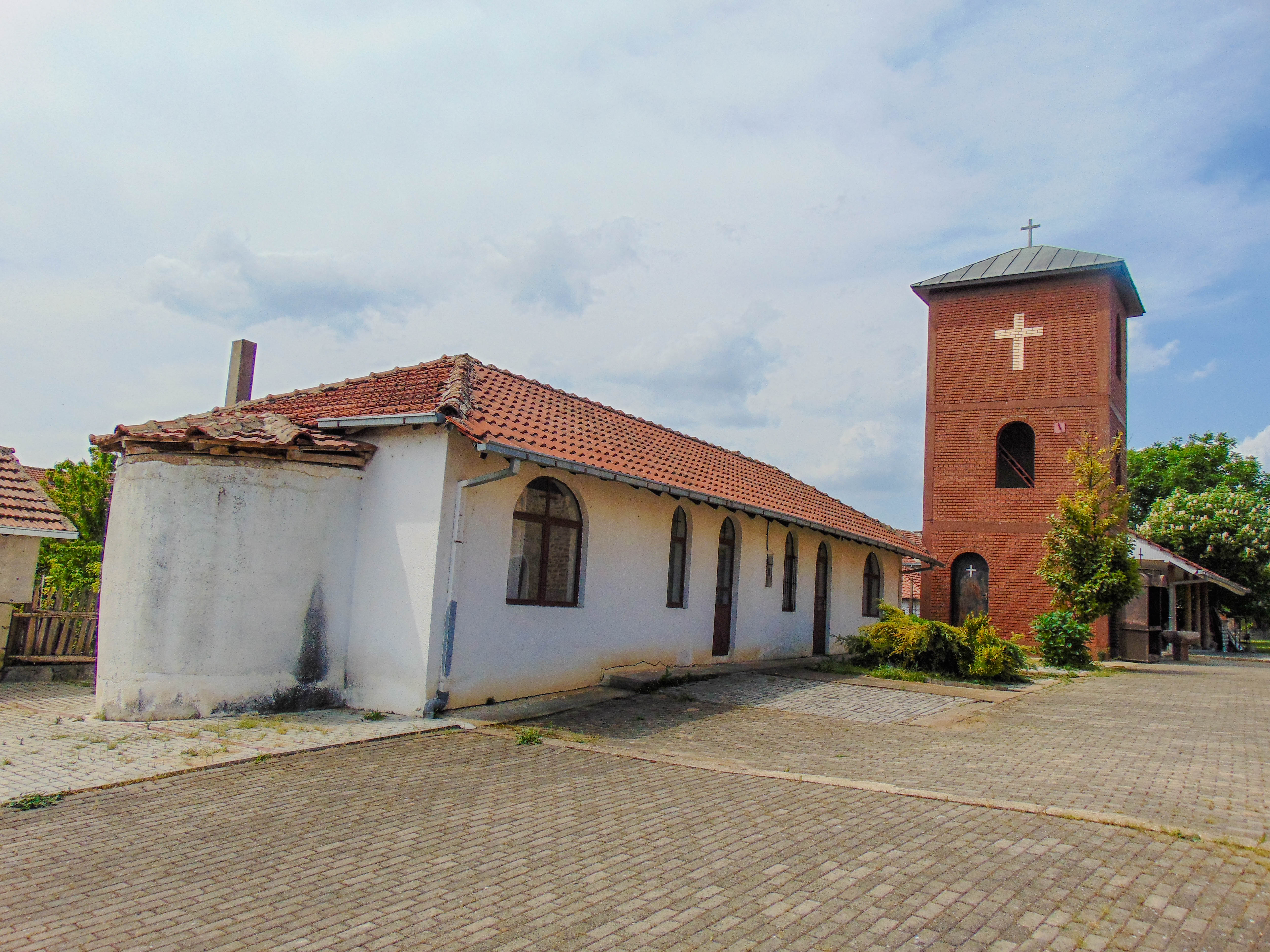 Црква „Св. Константин и Елена“ - Раклиш